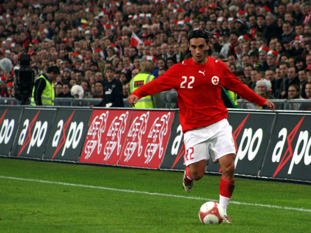 Hakan Yakin, St. Jakob Stadion, Basel (Switzerland), Switzerland - Brasil 1:2